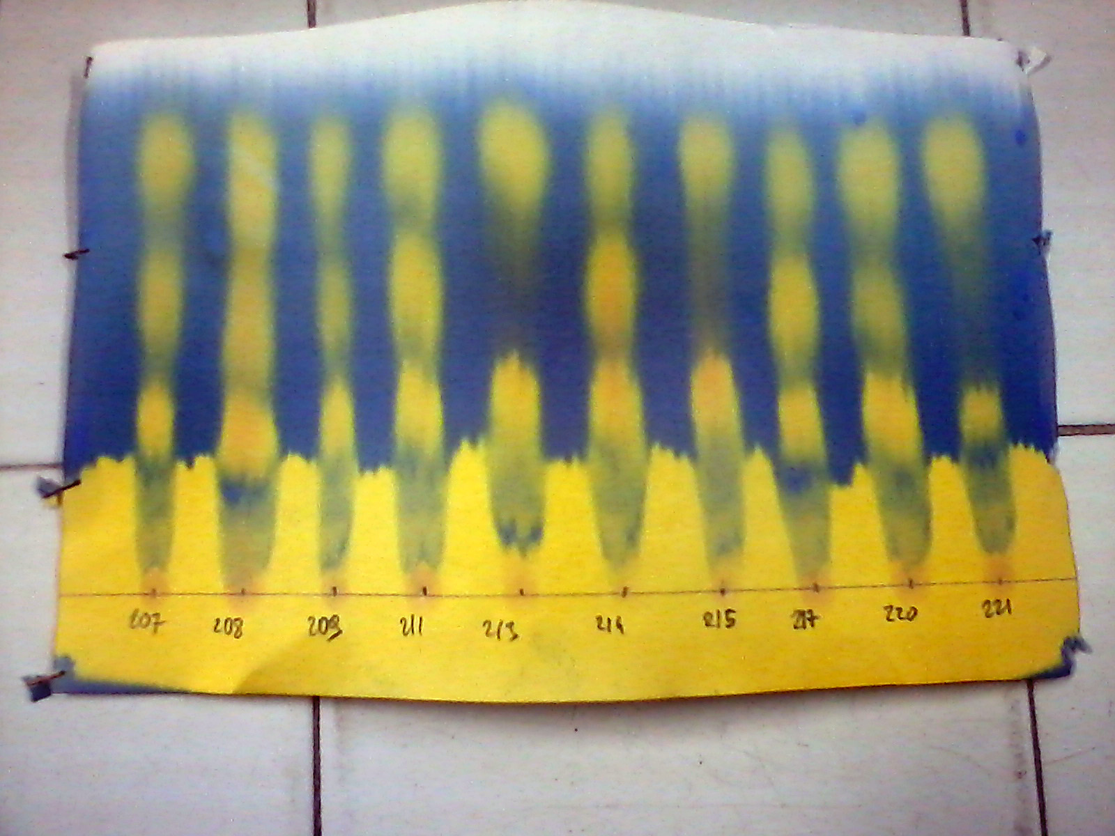 Lecture de la chromatographie avec taches des acides tartrique, malique et lactique